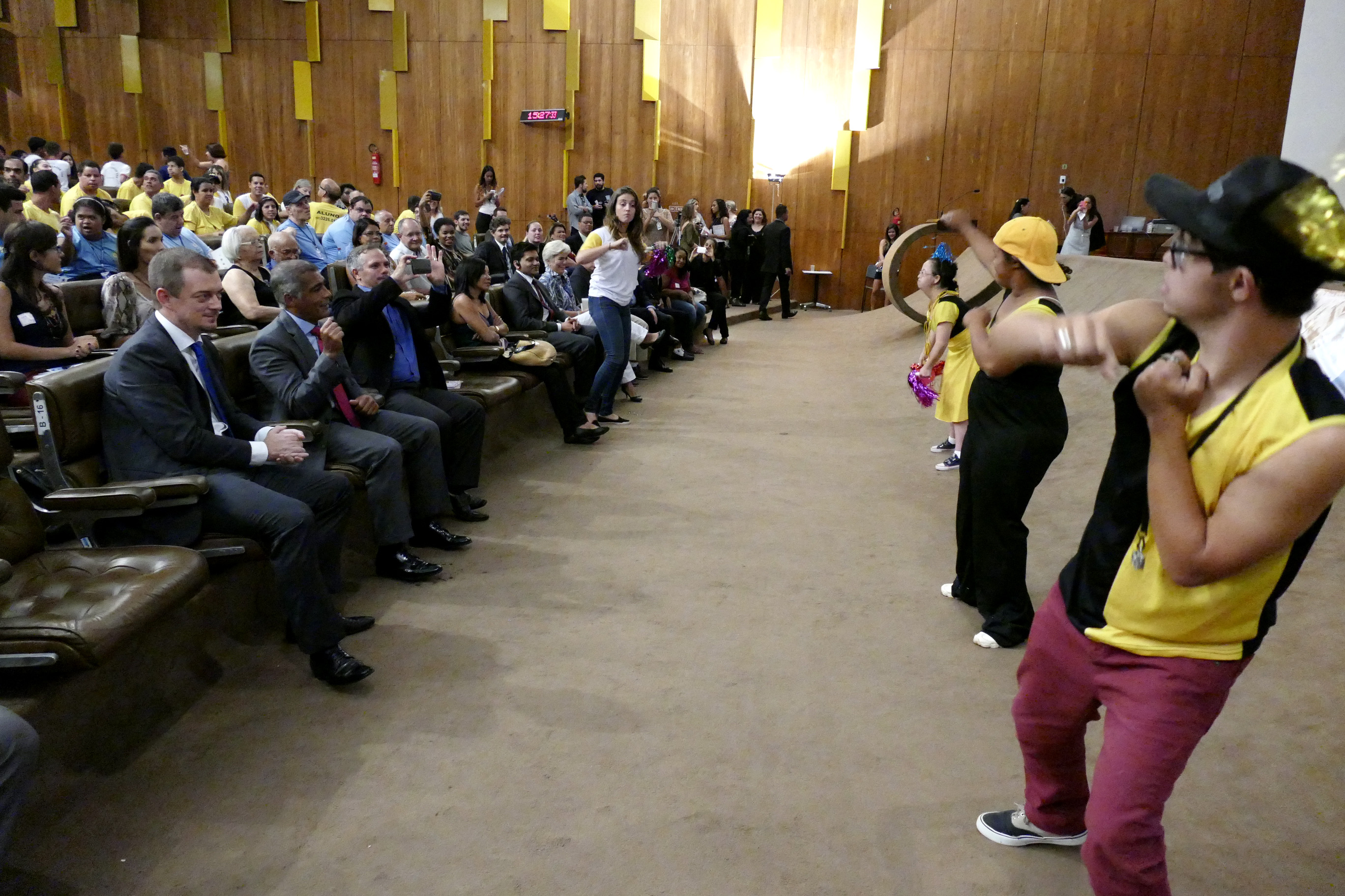 A Comissão de Educação, Cultura e Esportes (CE) promove o seminário 21 Horas pela Inclusão. A programação terá três dias de atividades sobre educação inclusiva, acessibilidade, comunicação, comportamento, entre outras. A abertura do evento, que tem o apoio da Embaixada do Reino Unido,tem início no dia 21 de março — quando é comemorado o Dia Internacional da Síndrome de Down. Participação do grupo musical Surdodum. Foto: Roque de Sá/Agência Senado